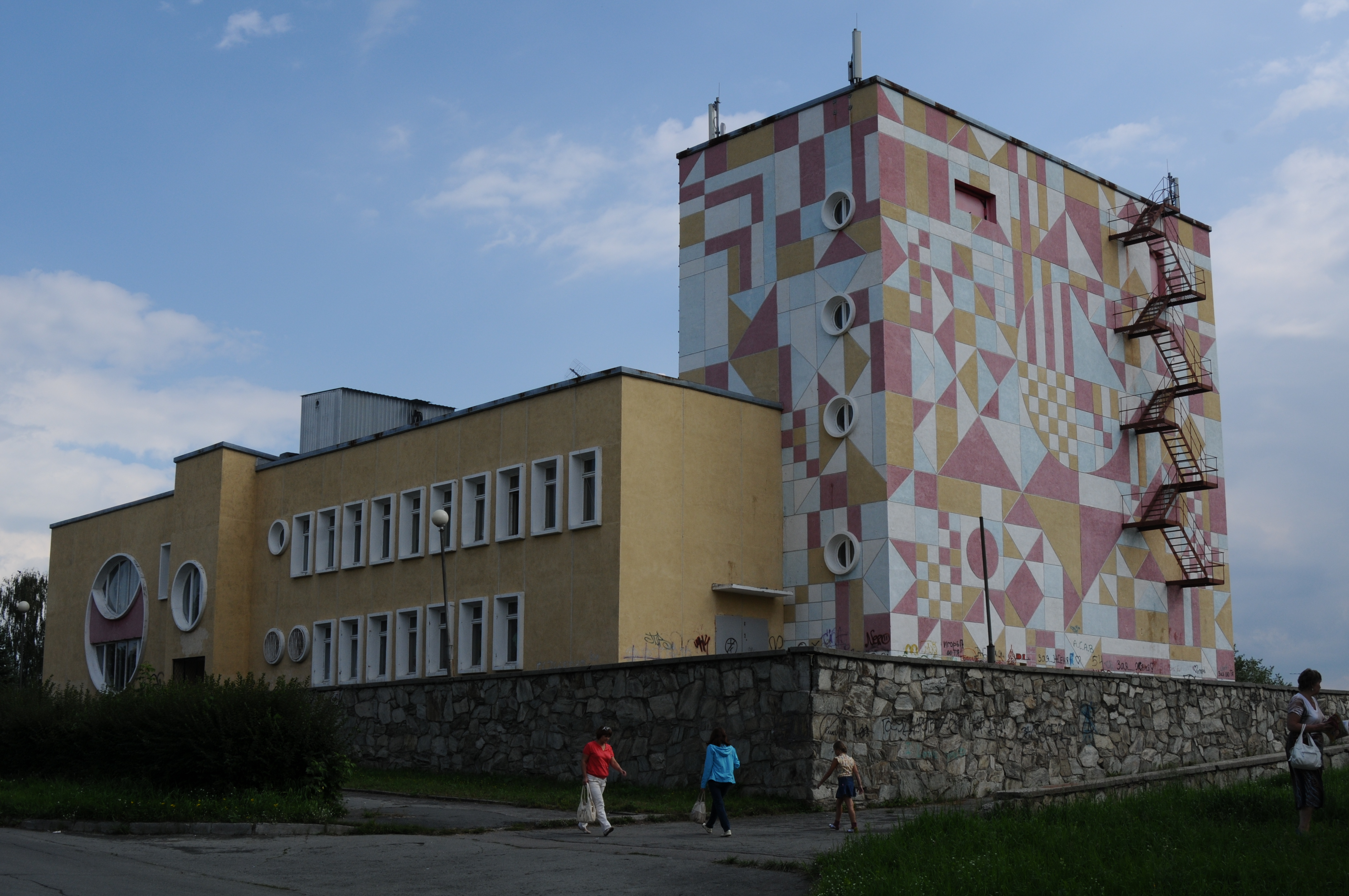 Кукольный театр "Золотой петушок" в городе Озерске (Челябинская область)